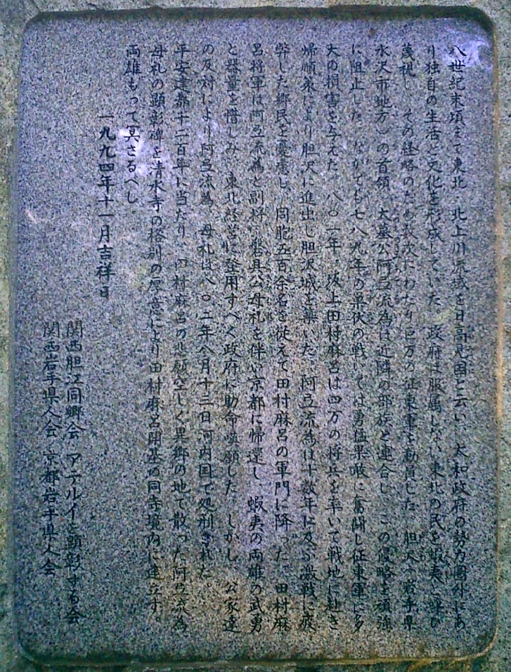 Monument_to_Aterui_and_More